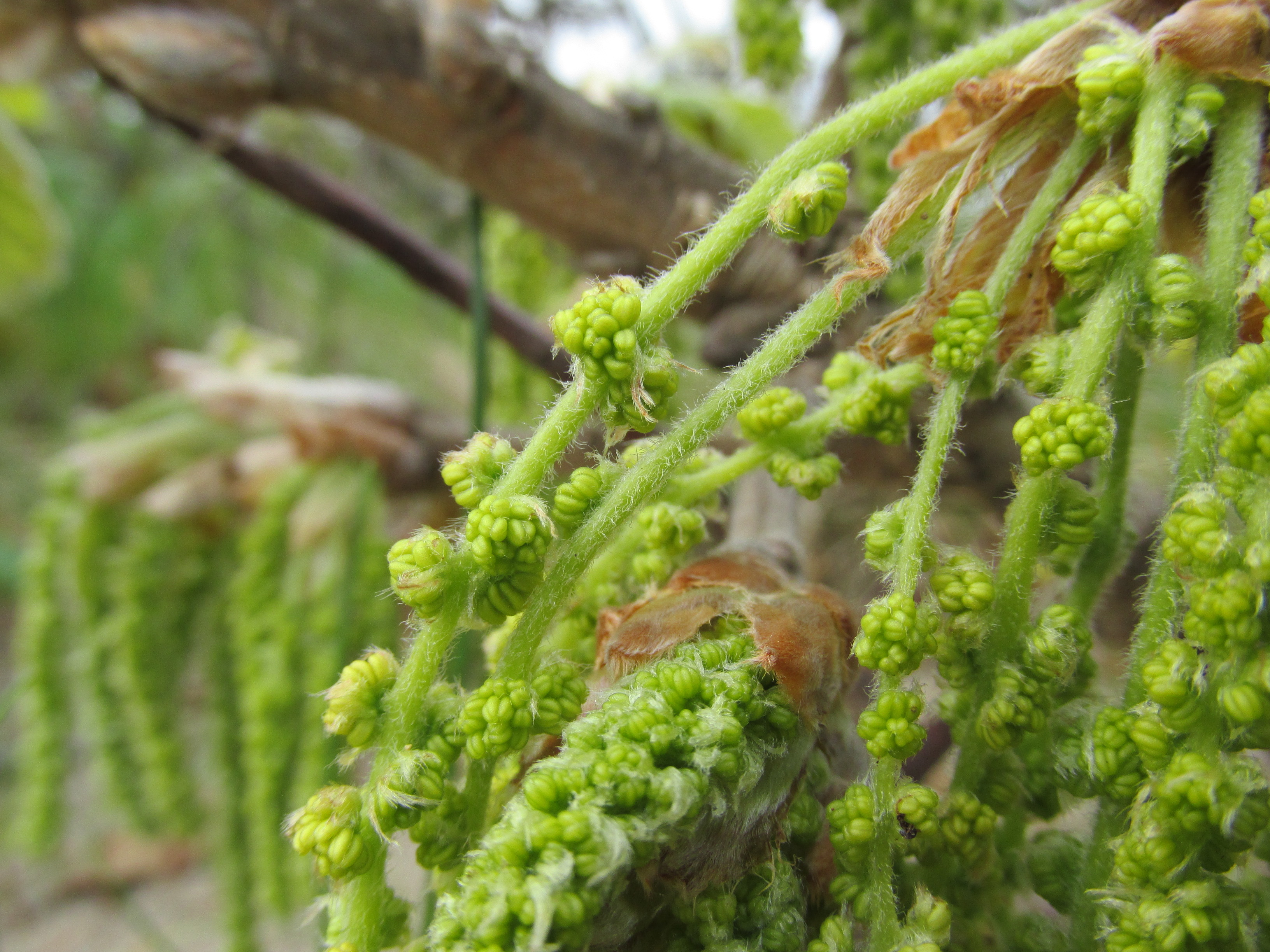 Quercus dentata , Daimyo Oak , カシワ（柏）, 雄花（♂）